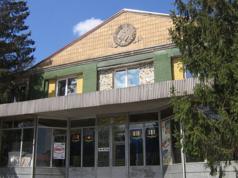 Будинок культури у Володарському